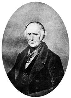 Портрет Петра Ильича Сорокоумовского